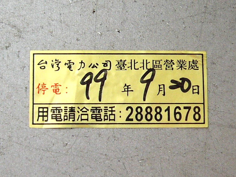 台灣電力公司台北北區營業處停電標籤。